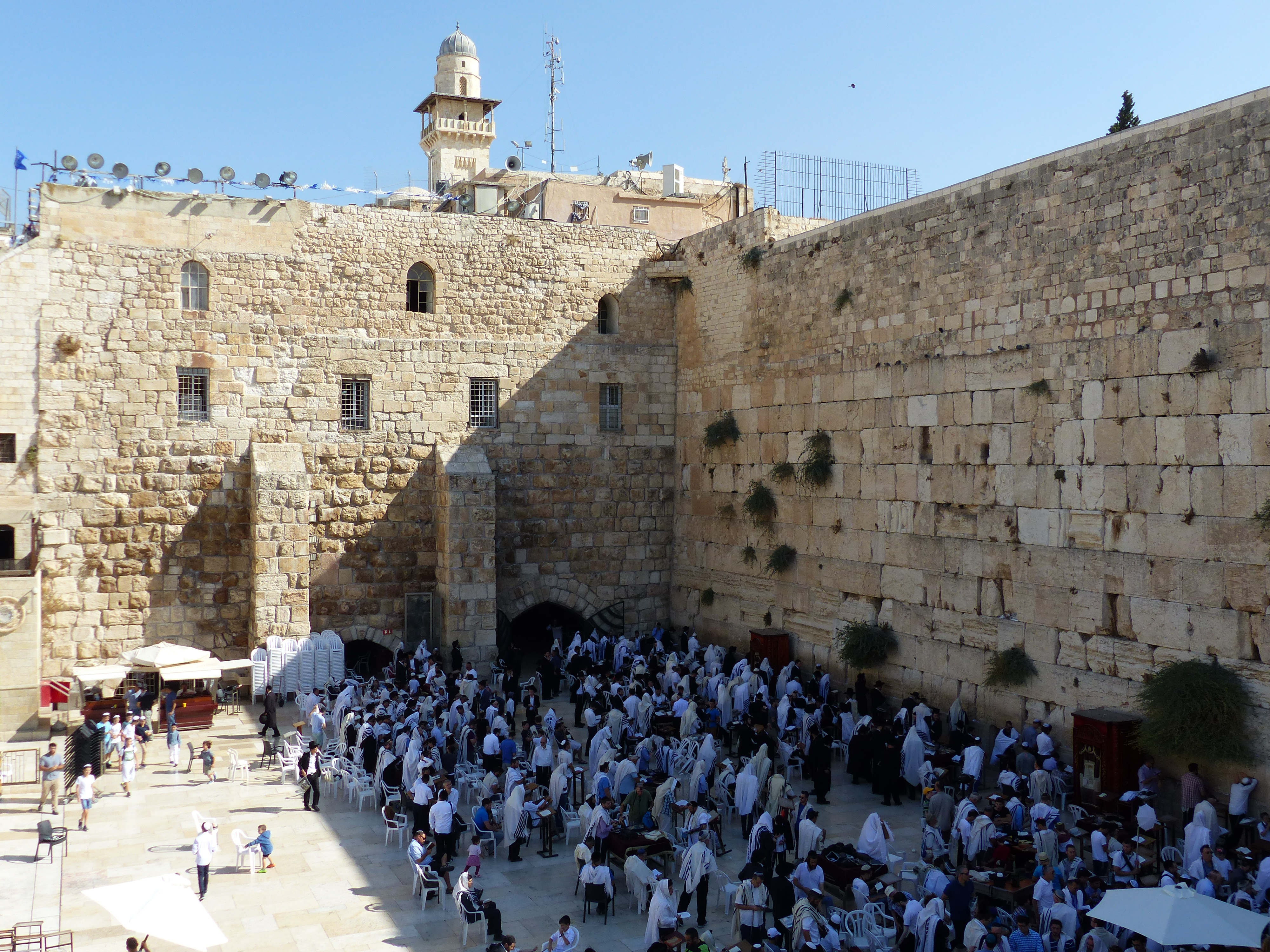 Fieles en el Muro de las Lamentaciones, Jerusalén